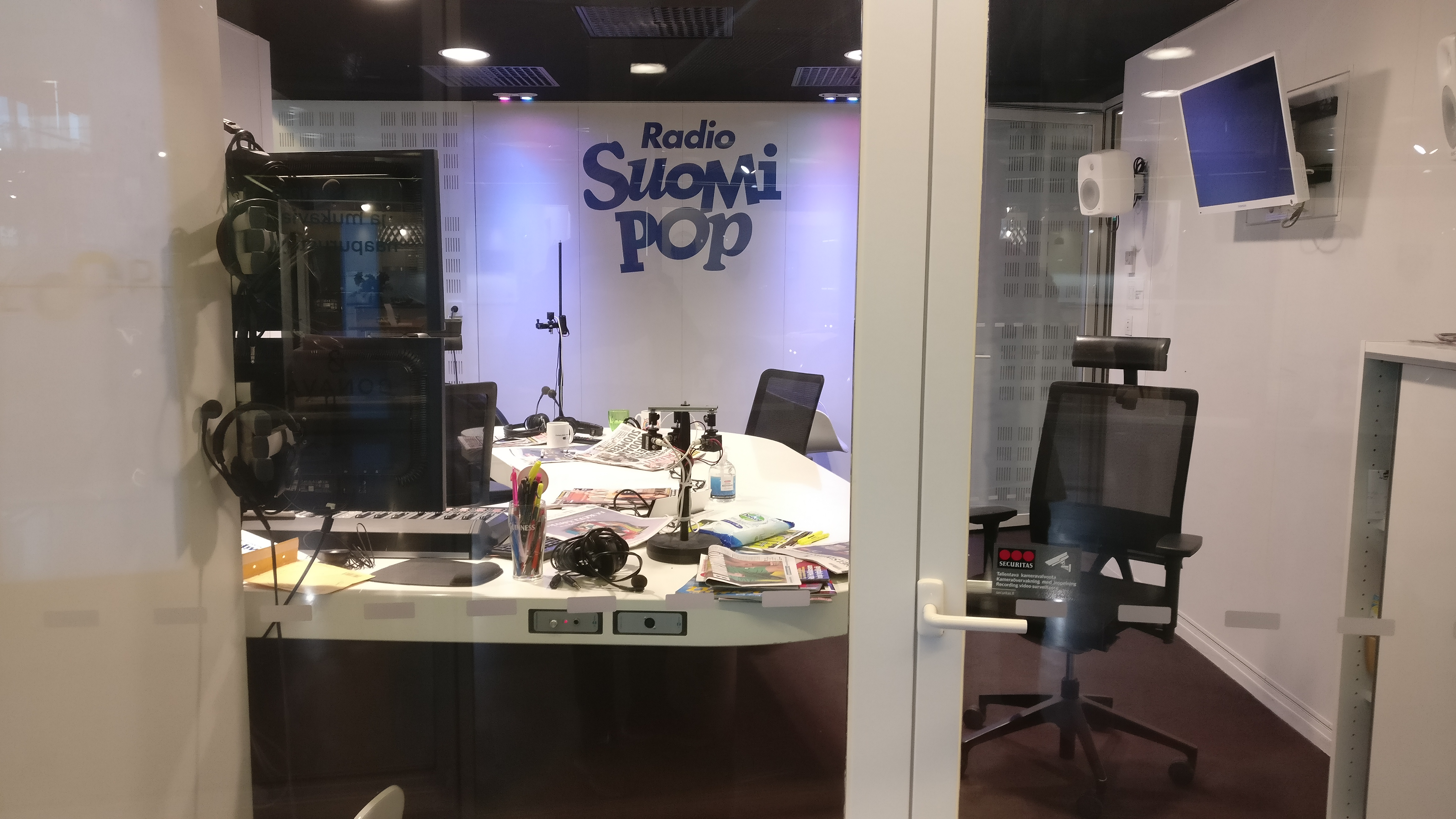 Radio Suomipopin studio Sanomatalossa Helsingissä.